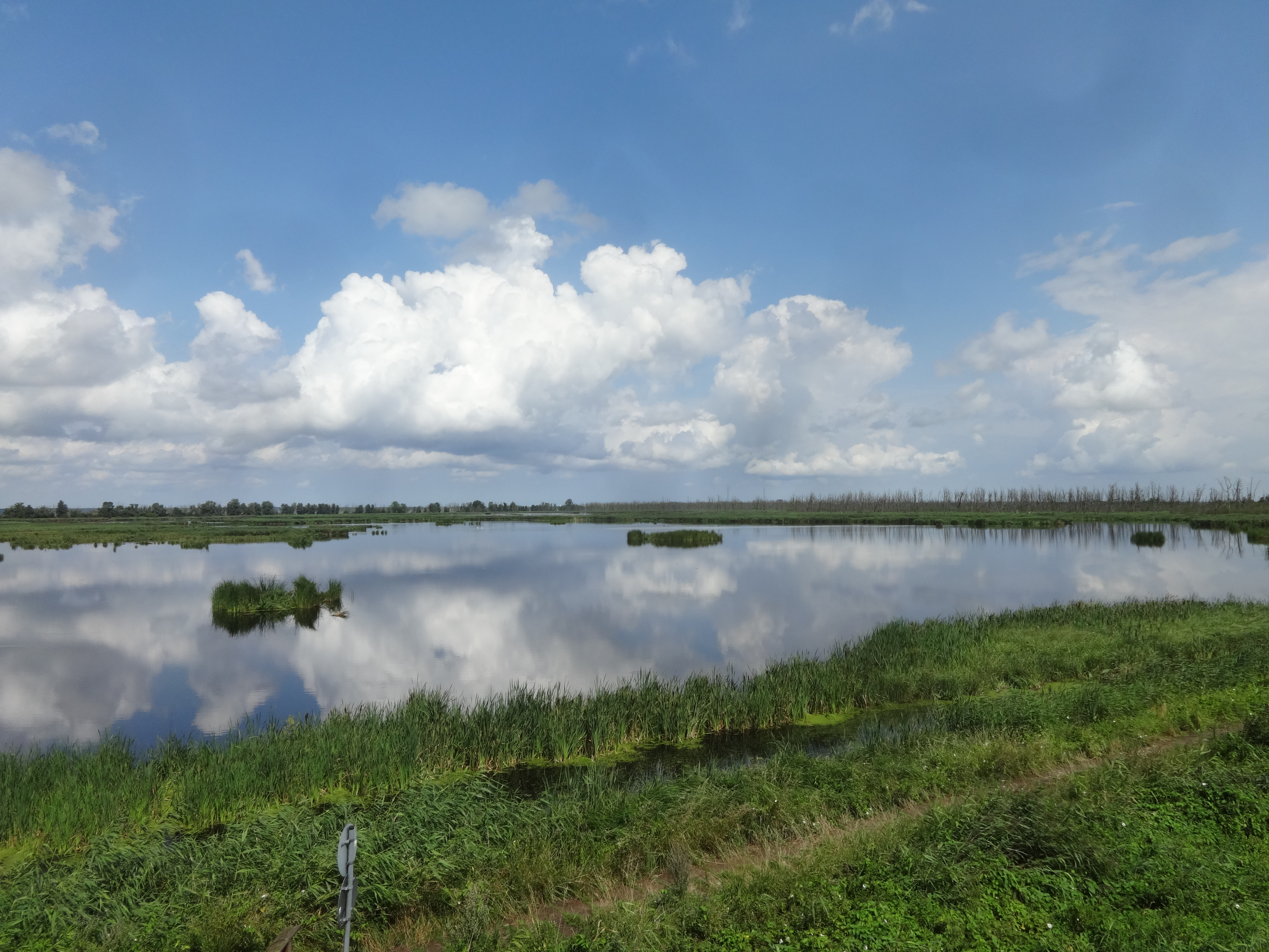 Blick vom Aussichtsturm südlich von Kamp auf das Anklamer Torfmoor